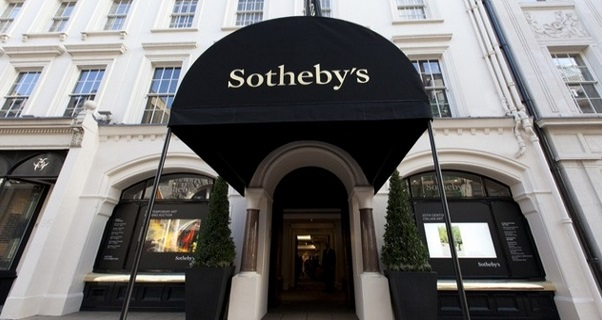 中文（香港）: 蘇富比倫敦辦事處